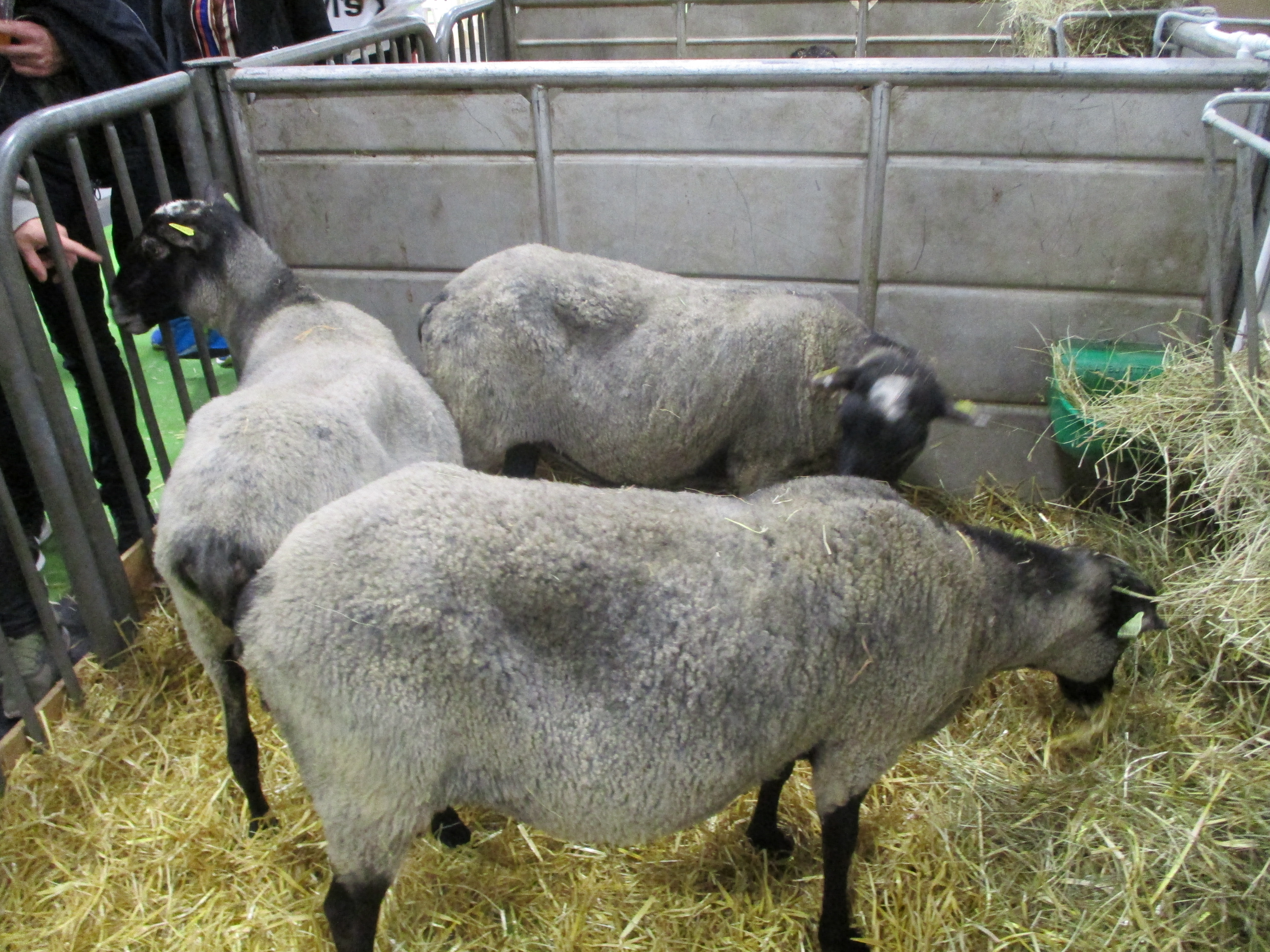 Moutons romanov au salon de l'agriculture de Paris 2019.